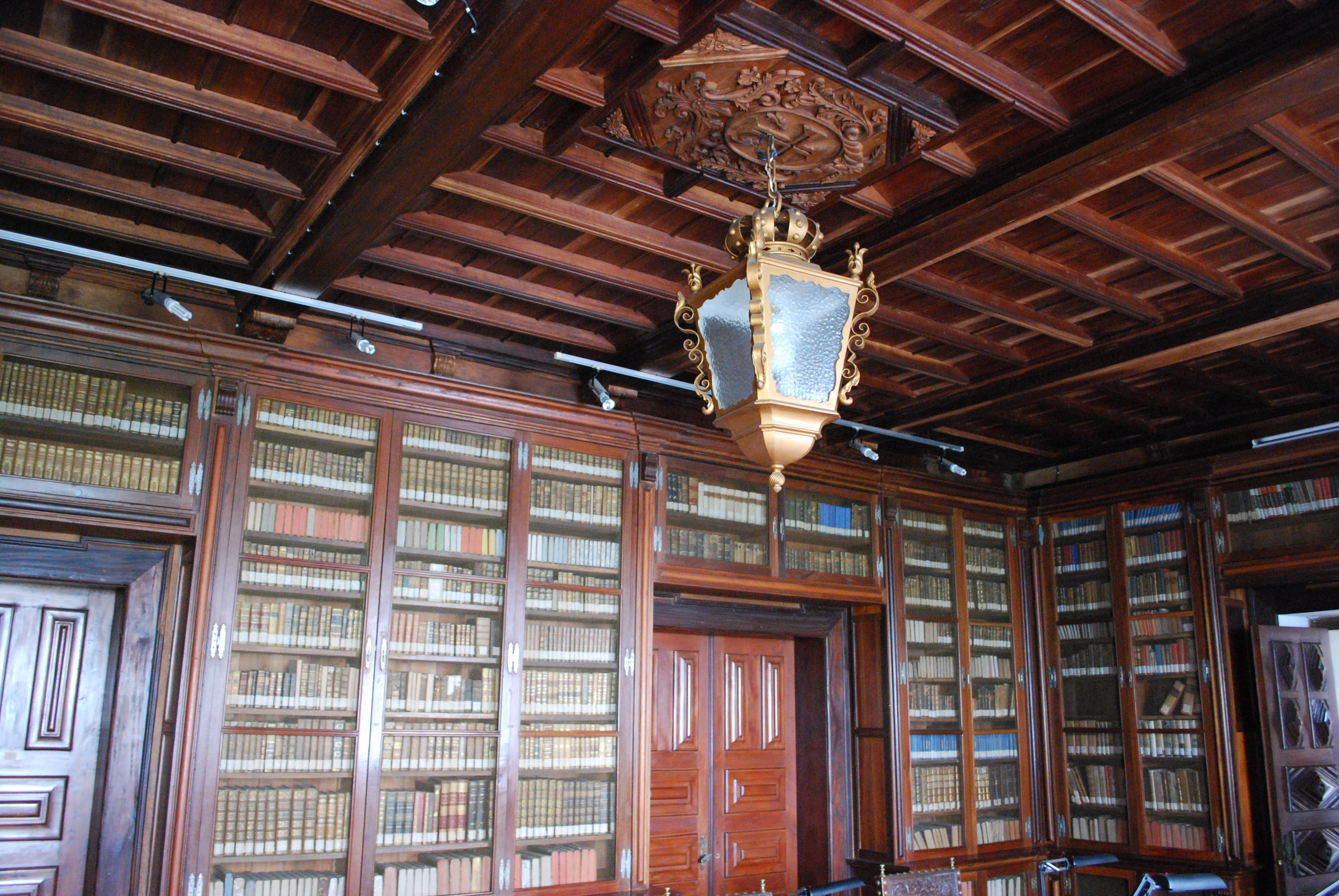 Sala da Biblioteca de Angra com tecto de madeira.